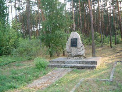 Obelisk w Kucharach.